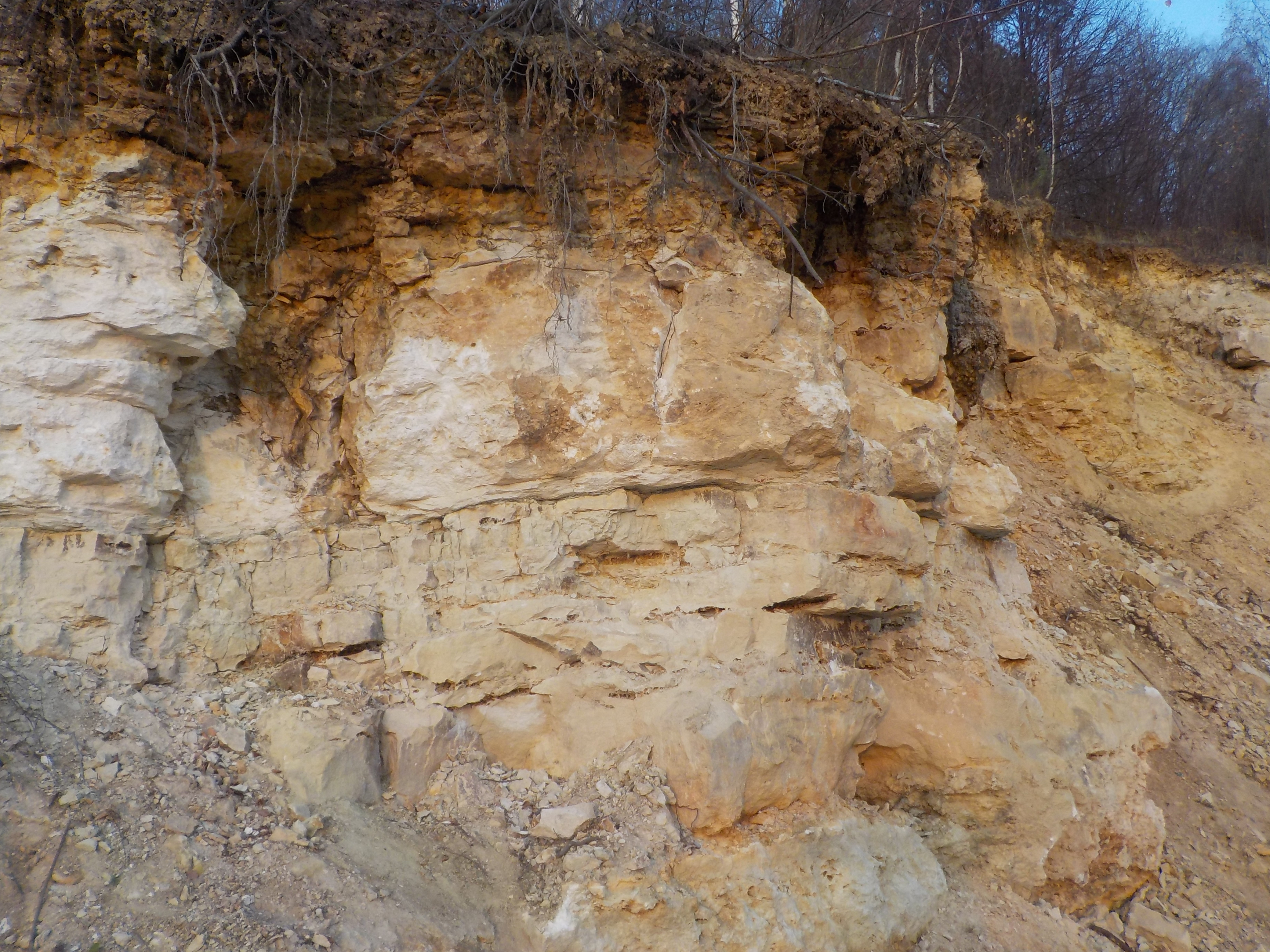 Месторождения известняка на берегу Пахры в районе деревни Кутьино